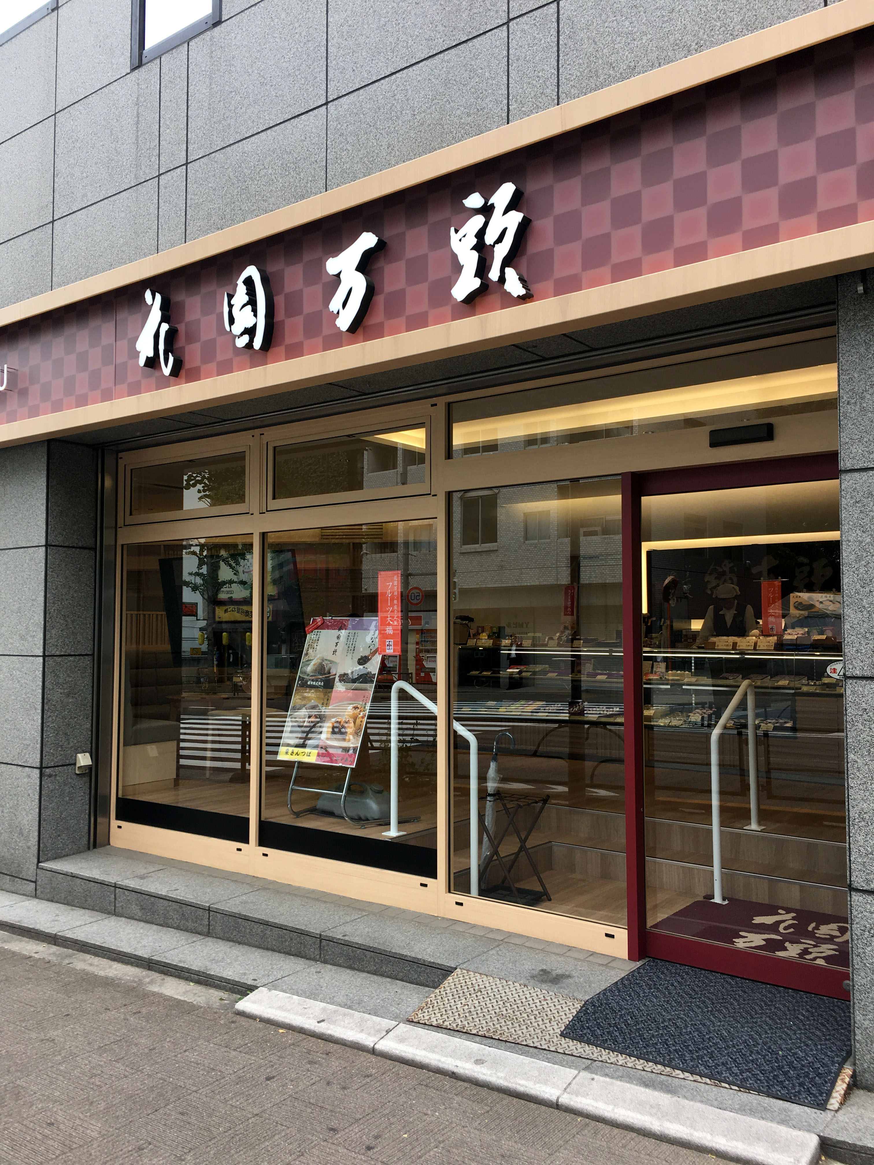 新宿の和菓子屋・花園万頭